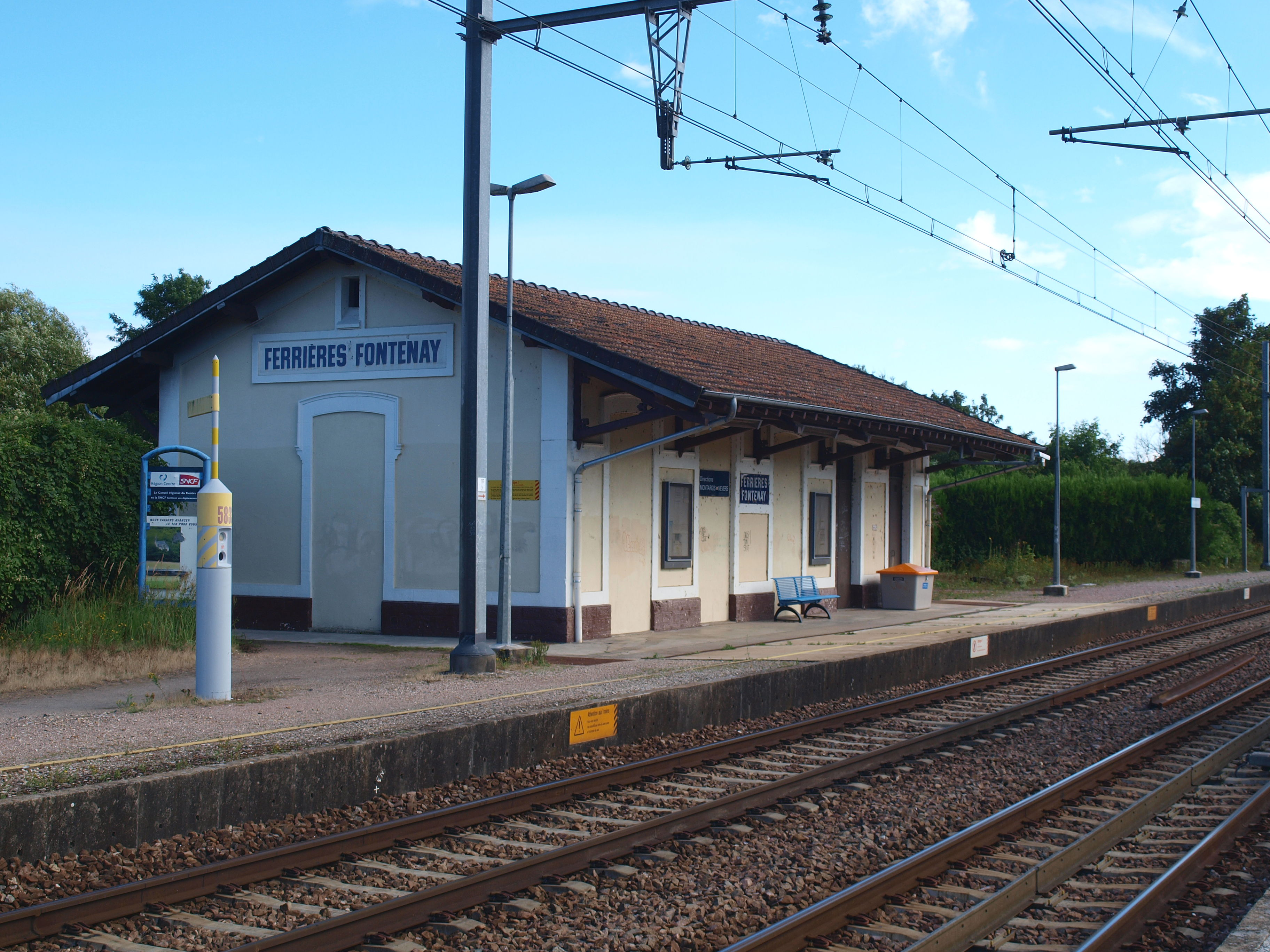 Gare SNCF de Ferrières-Fontenay à Fontenay-sur-Loing (Loiret, France)